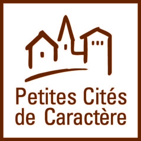 logo des Petites Cités de Caractère